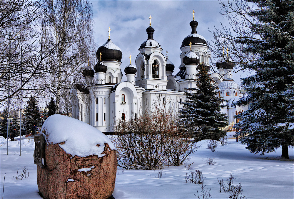 Баранавіцкія замалёўкі. Храм Святых Жонак-Міраносіц